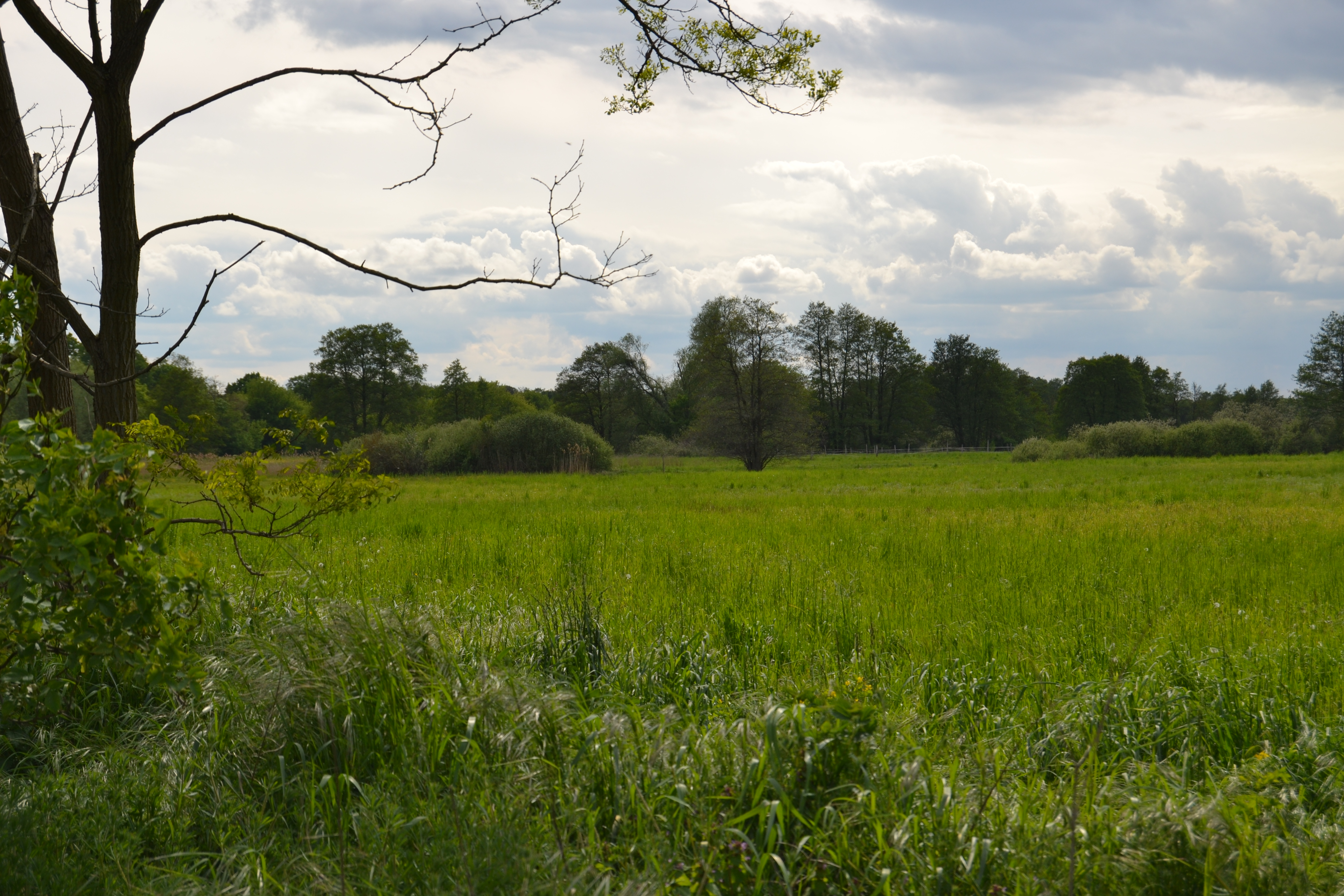 FFH-Gebiet Fredersdorfer Mühlenfließ, Breites und Krummes Luch in Schöneiche bei Berlin im Mai 2014.